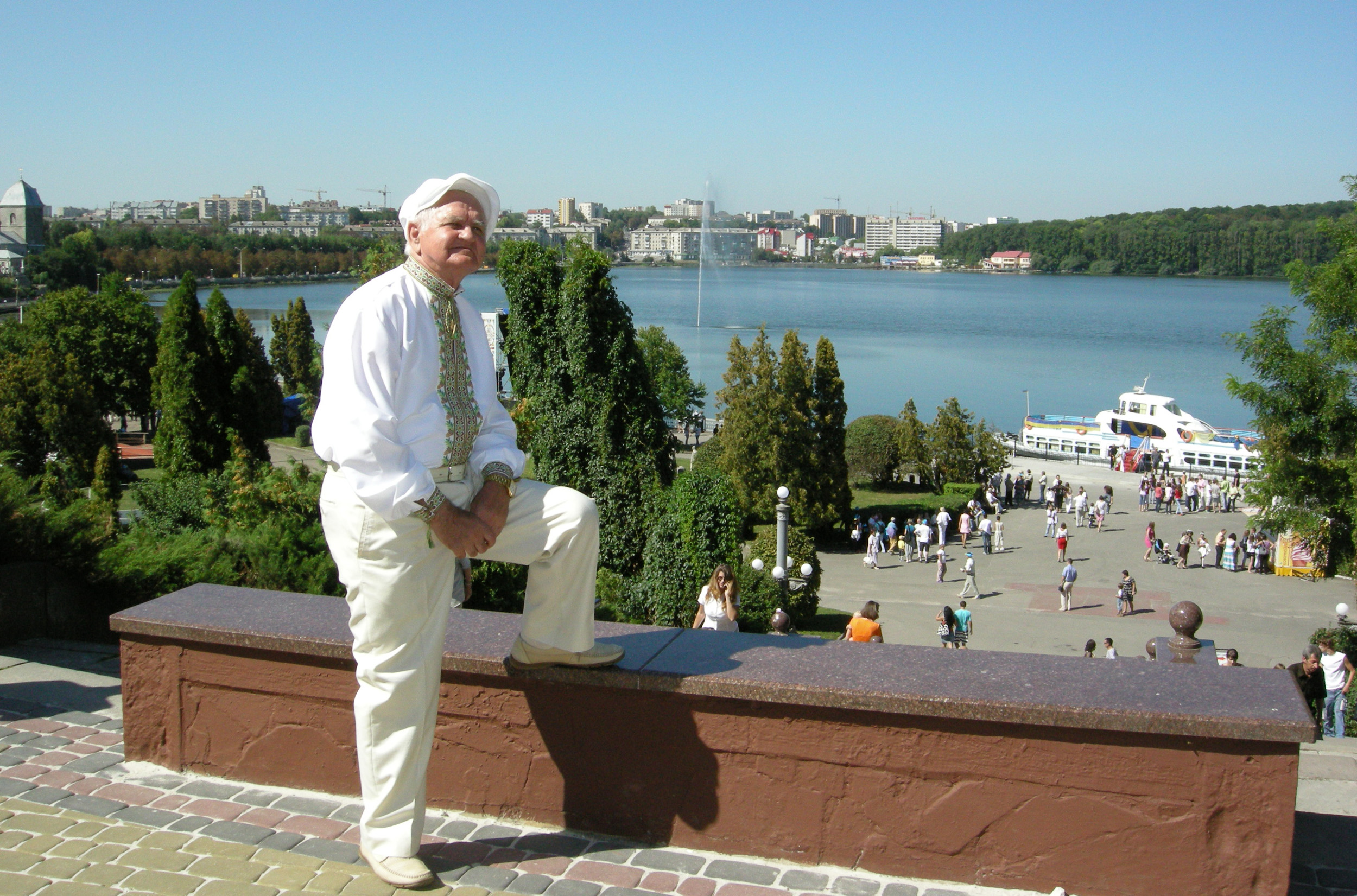 Український краєзнавець, етнограф, літературознавець, громадський діяч Остап Степанович Черемшинський у Тернополі.